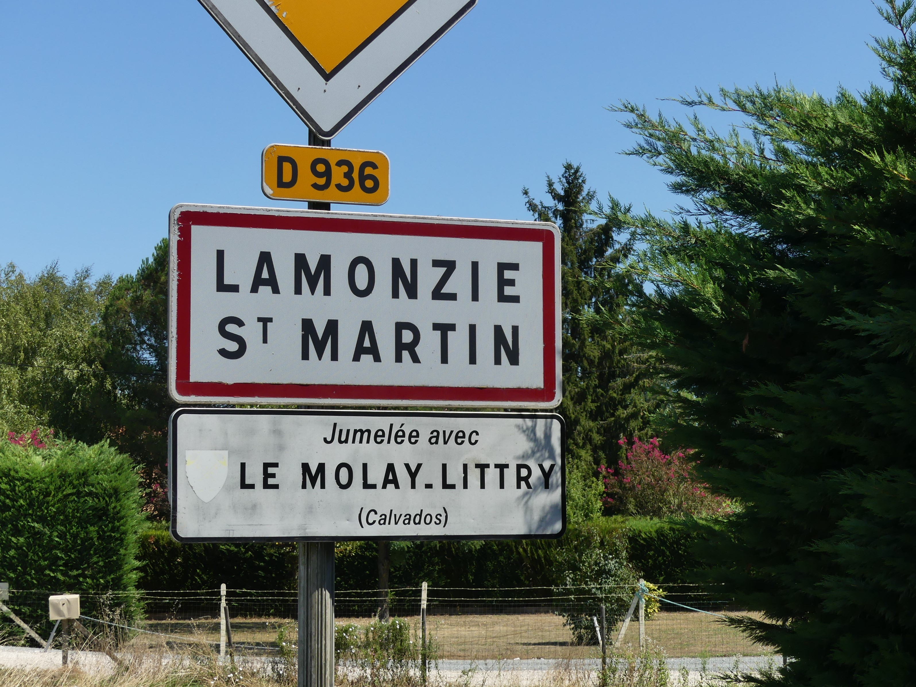 Panneau de jumelage de Lamonzie-Saint-Martin, Dordogne, France.